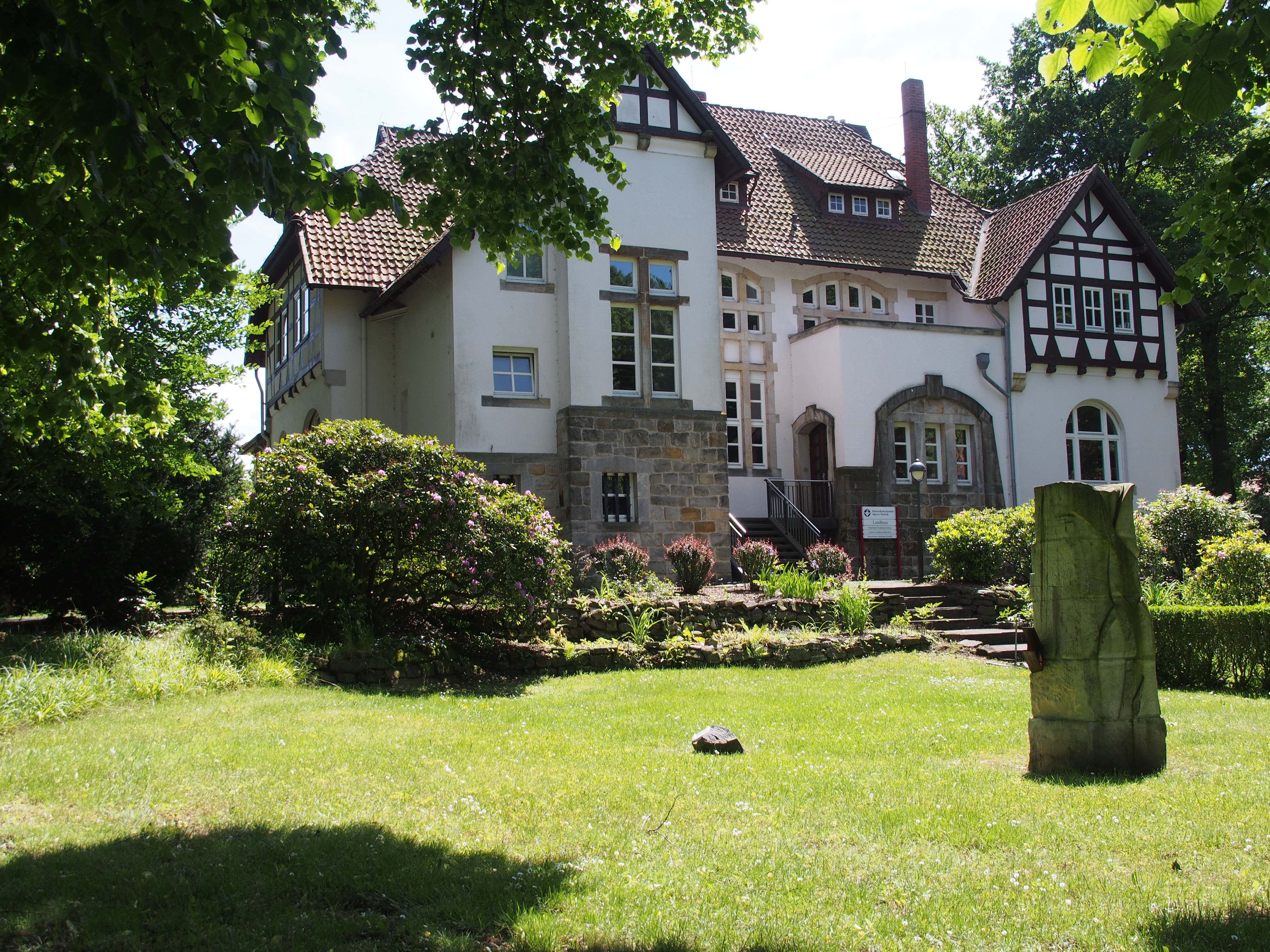 "Landhaus" der Heimvolkshochschule Hustedt Jägerei, Stadt Celle, Niedersachsen (Germany)